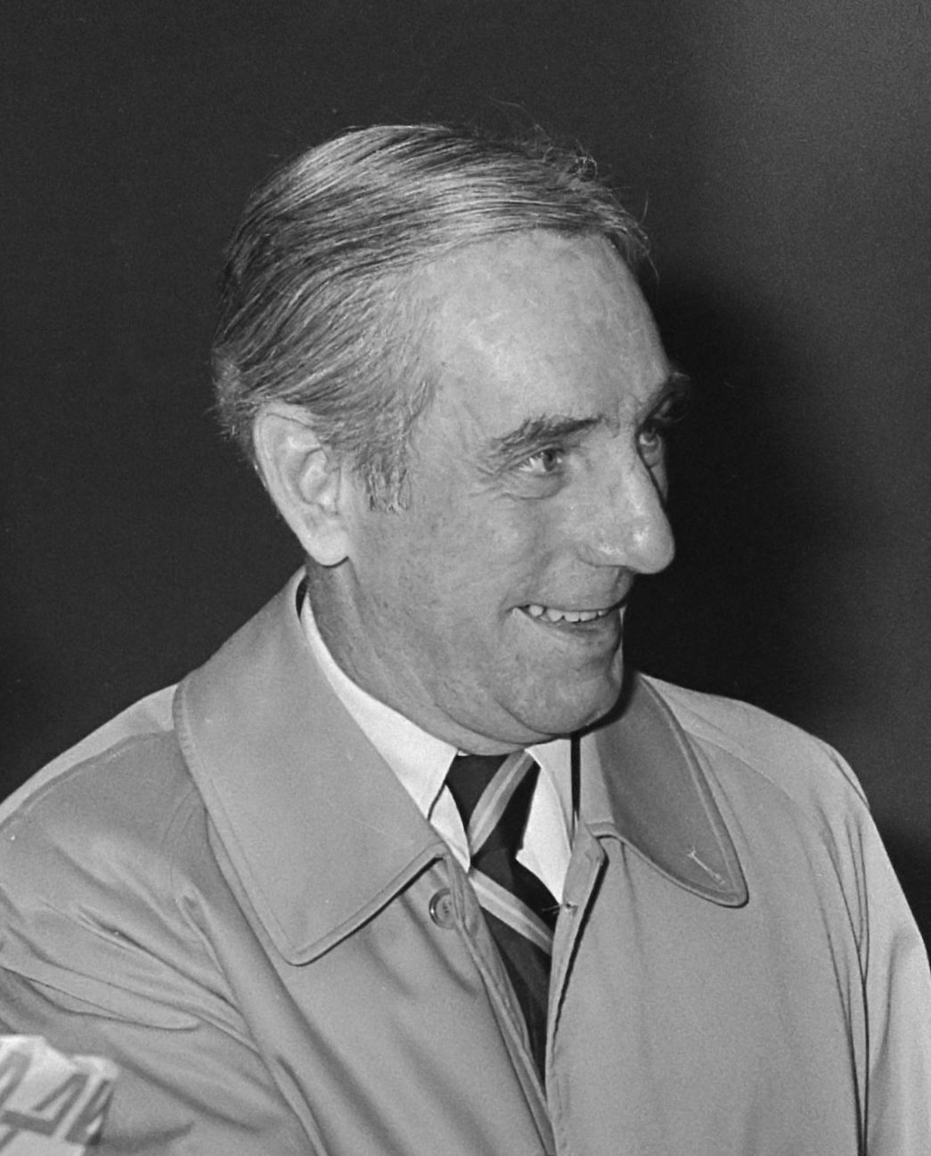 Afscheid van ambassadeur Mc Closkey (midden) van de VS echtgenote op Schiphol 10 maart 1978